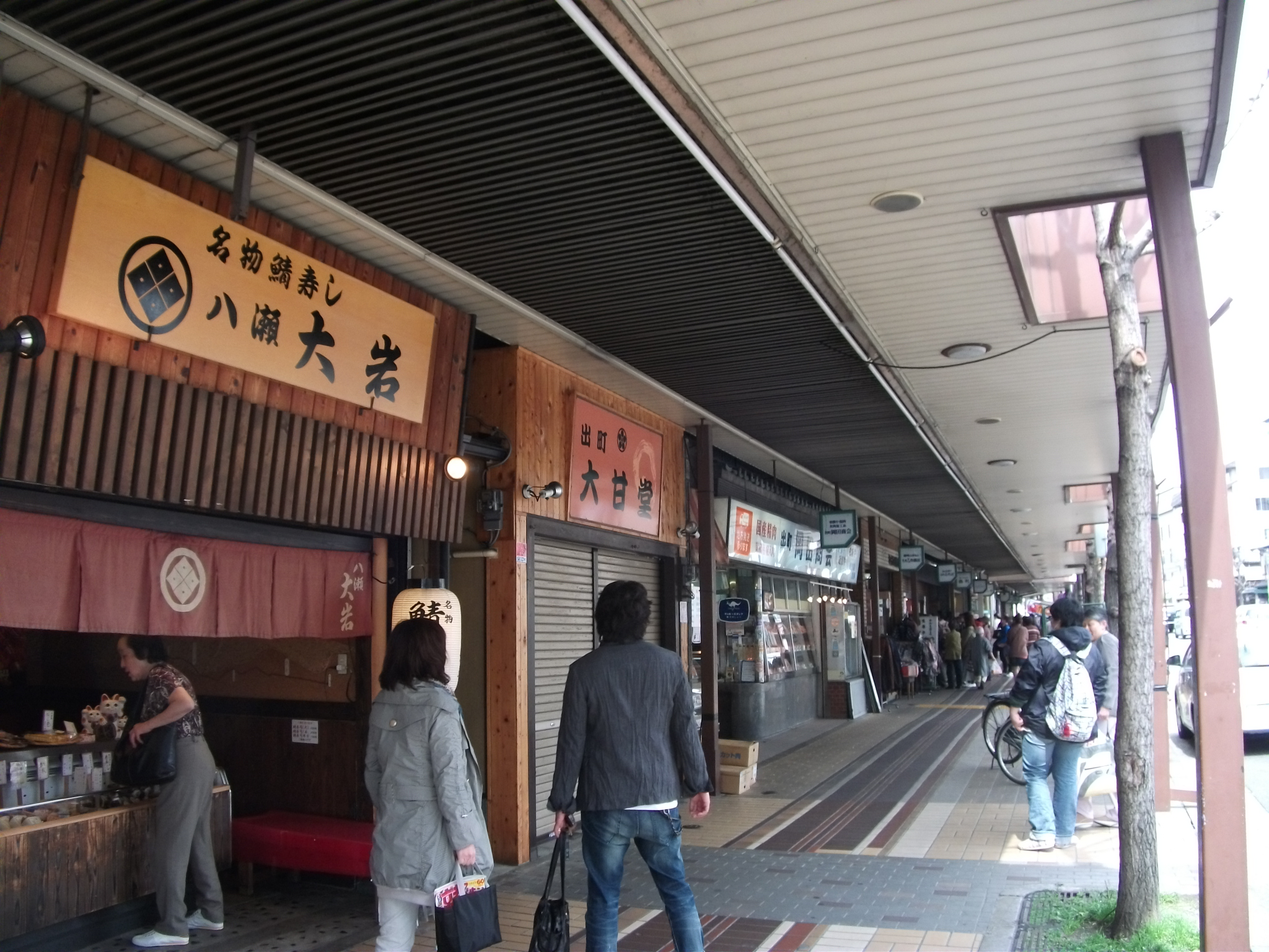 京都市上京区、出町商店街 河原町通沿いの街並み。